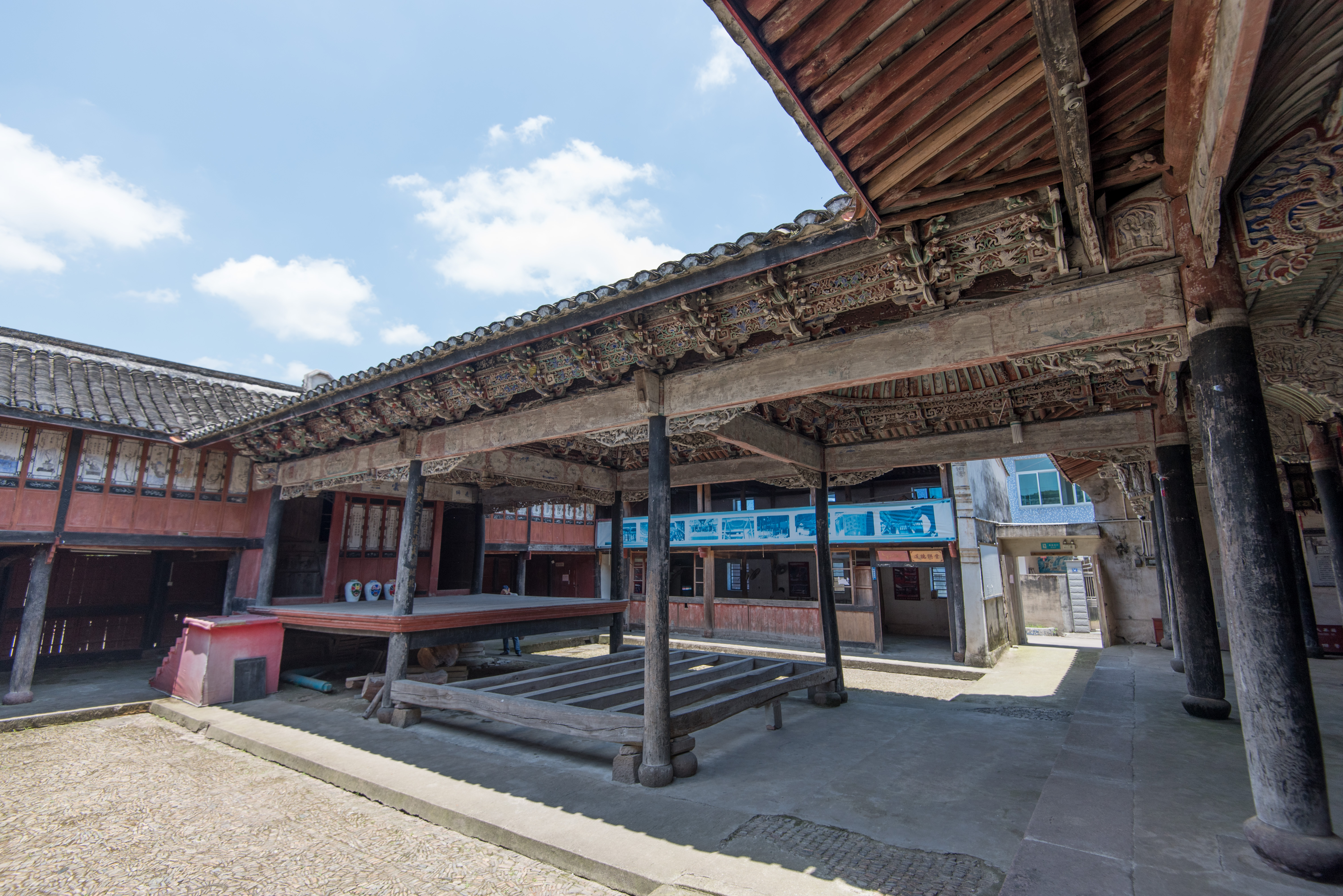 岙胡胡氏宗祠（戏台为全国重点文物保护单位）